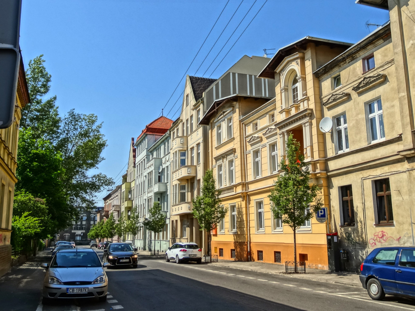 Ulica Obrońców Bydgoszczy w Bydgoszczy